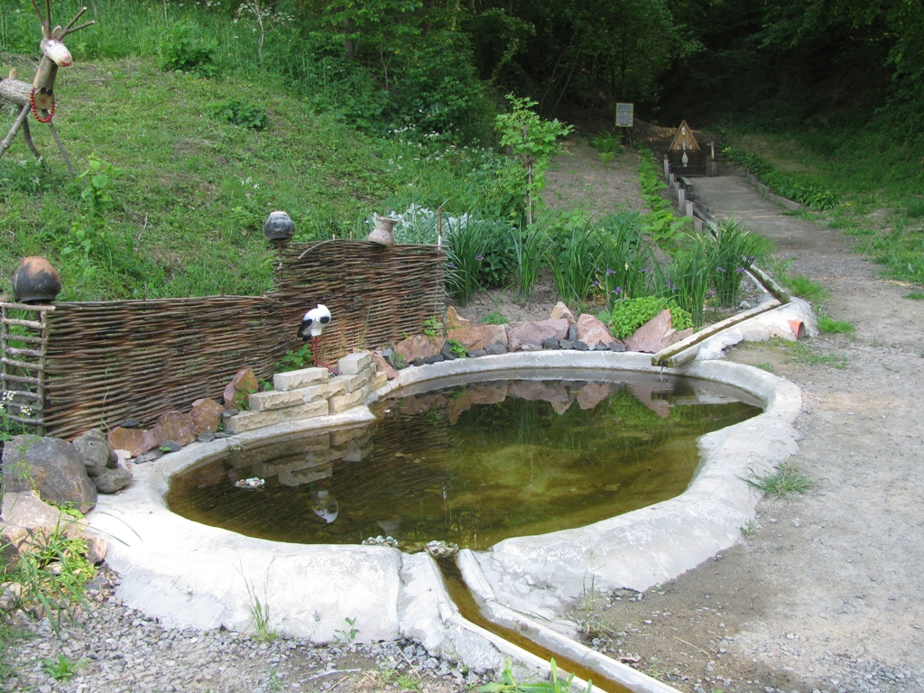 Невеличке штучне озеро (Мусійове джерело)